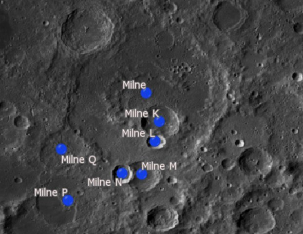 Cráter lunar Milne. Cráteres satélite. (Imagen LRO)